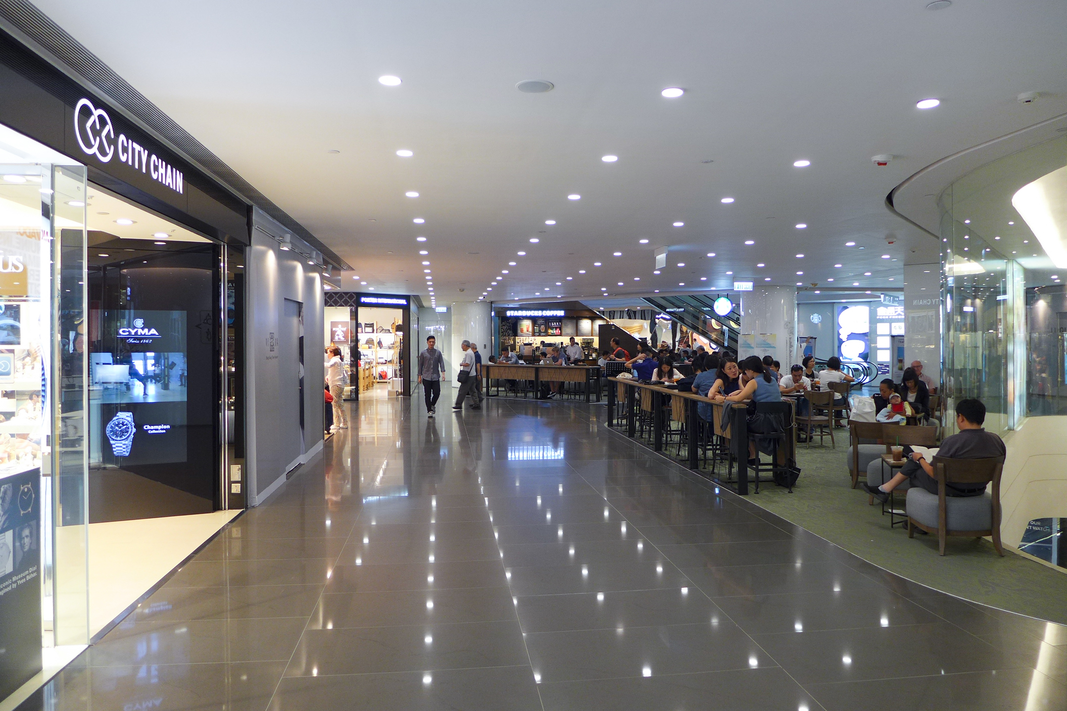 Times Square Level 9